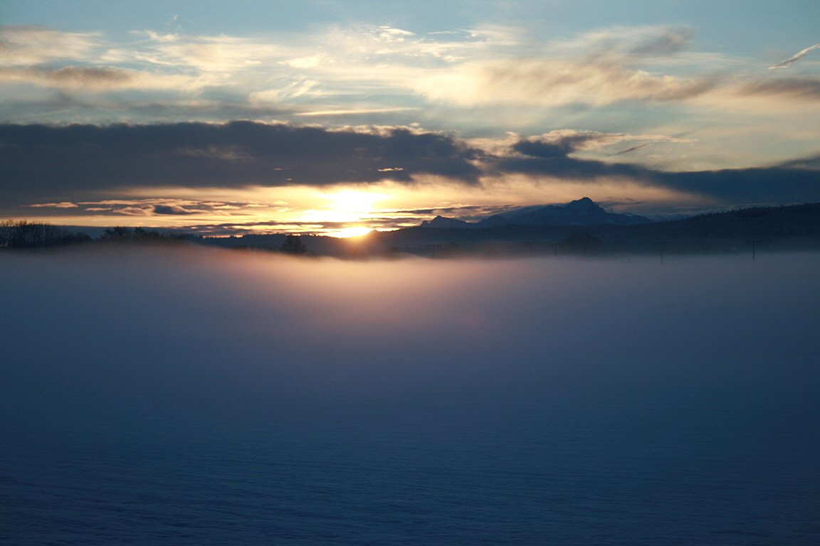 Ortsausgang von Holzkirchen mit Wendelstein